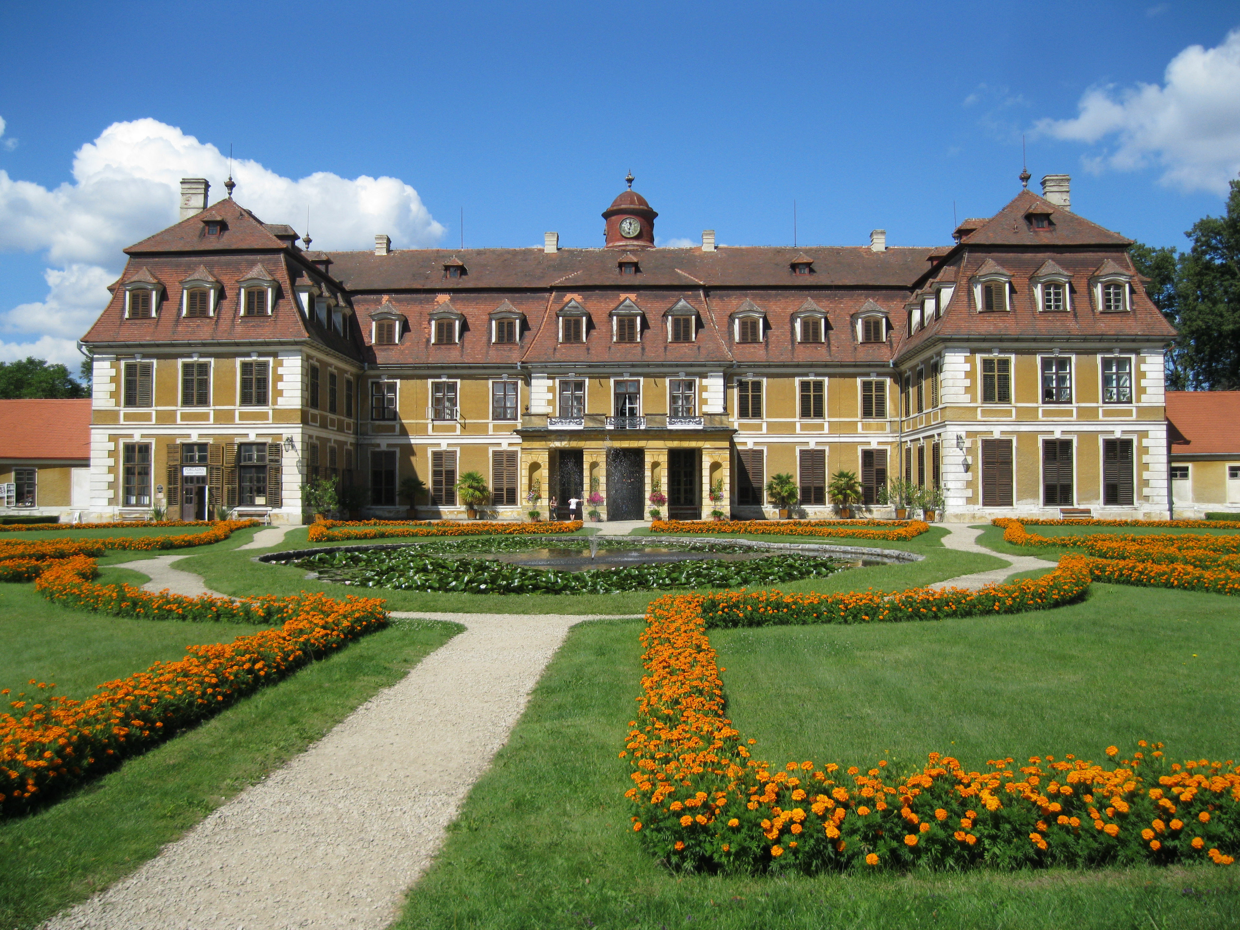 Zámek Rájec